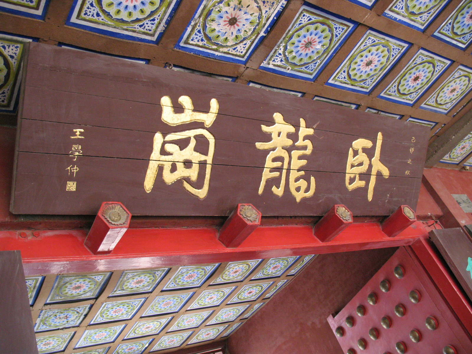 Nanyang Memorial Temple to Wuhou 河南南阳武侯祠